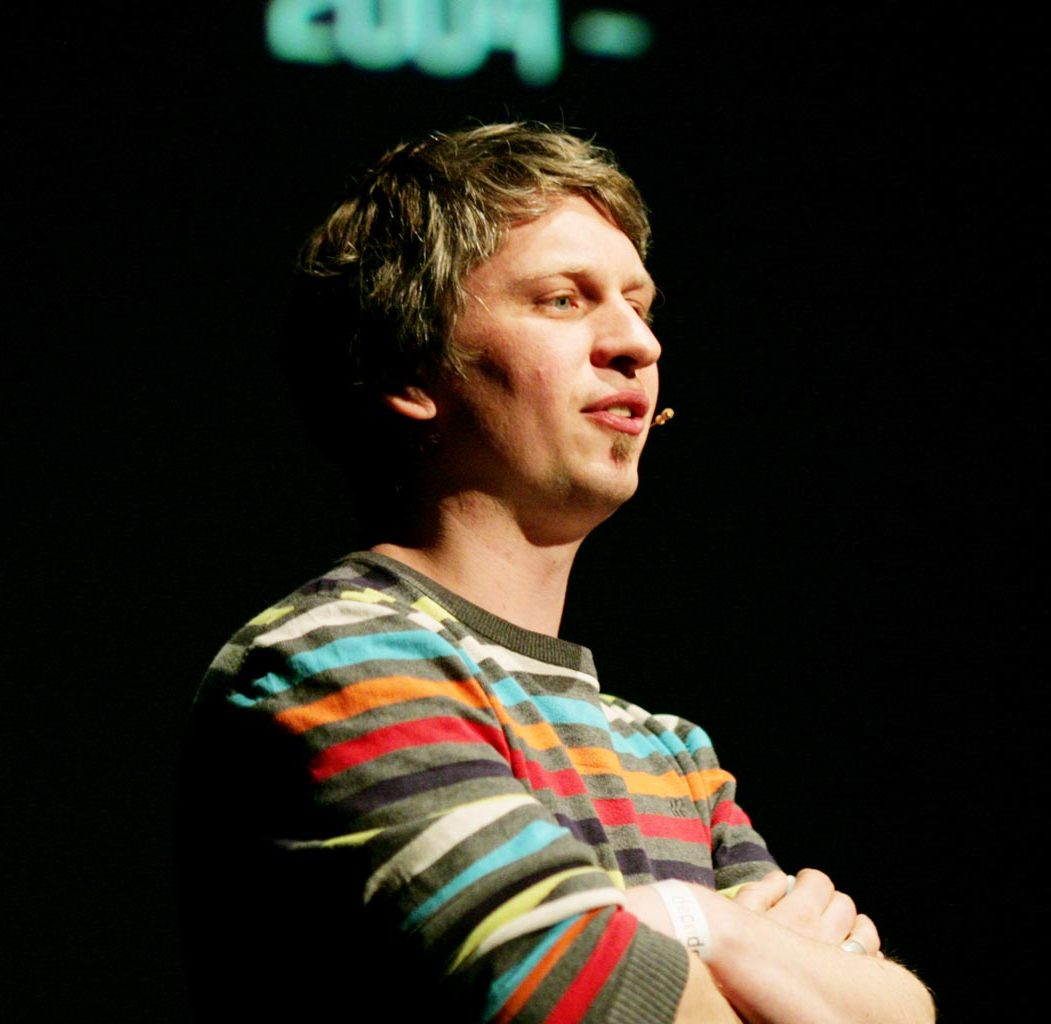 Lasst die Daten sprechen!